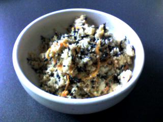 Stir-fried okara